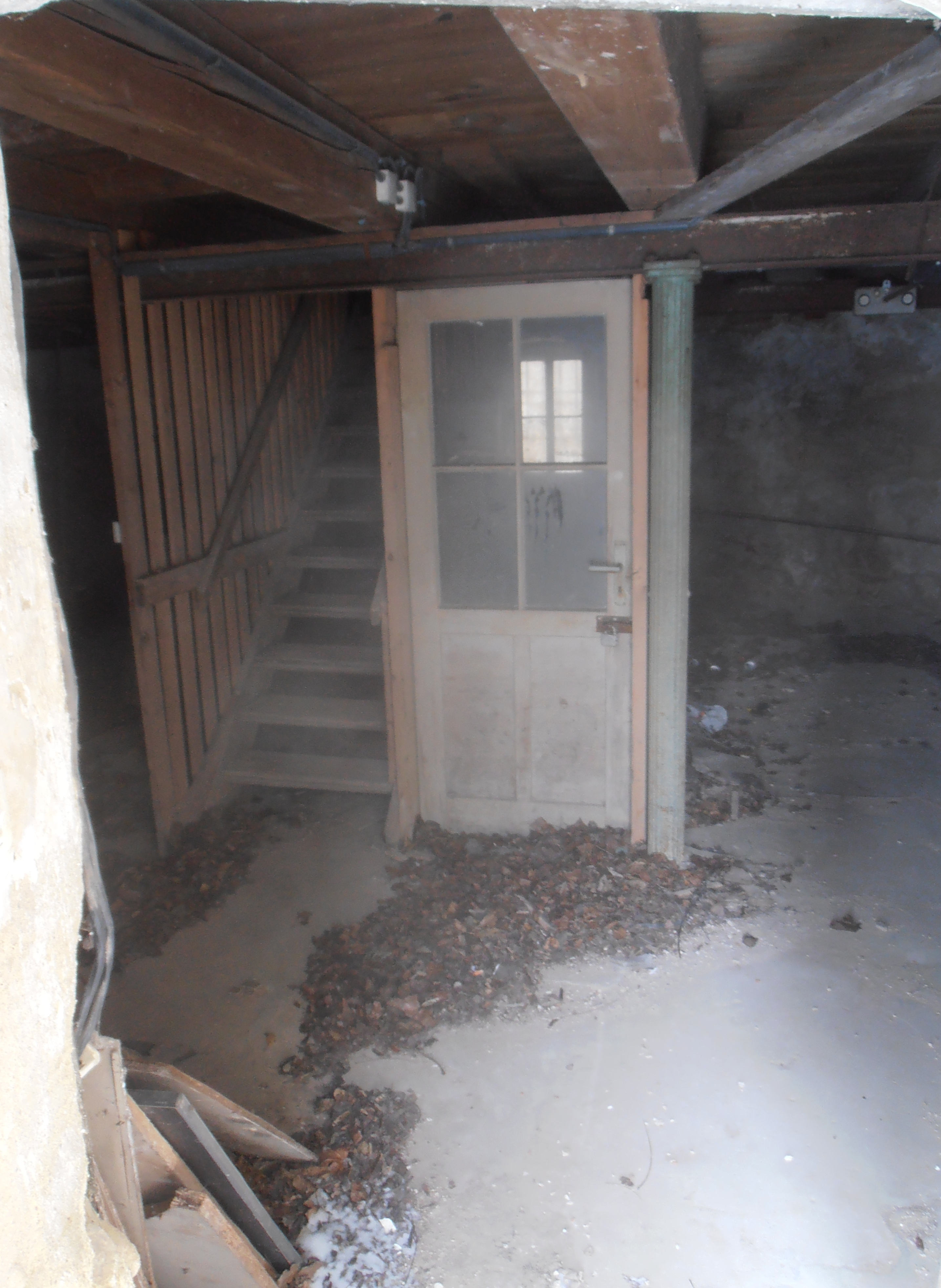 Denkmalgeschützte Turm Holländer-Windmühle in der Kötzschenbroder Straße 9 in Dresden-Mickten; Blick durch die Eingangstür